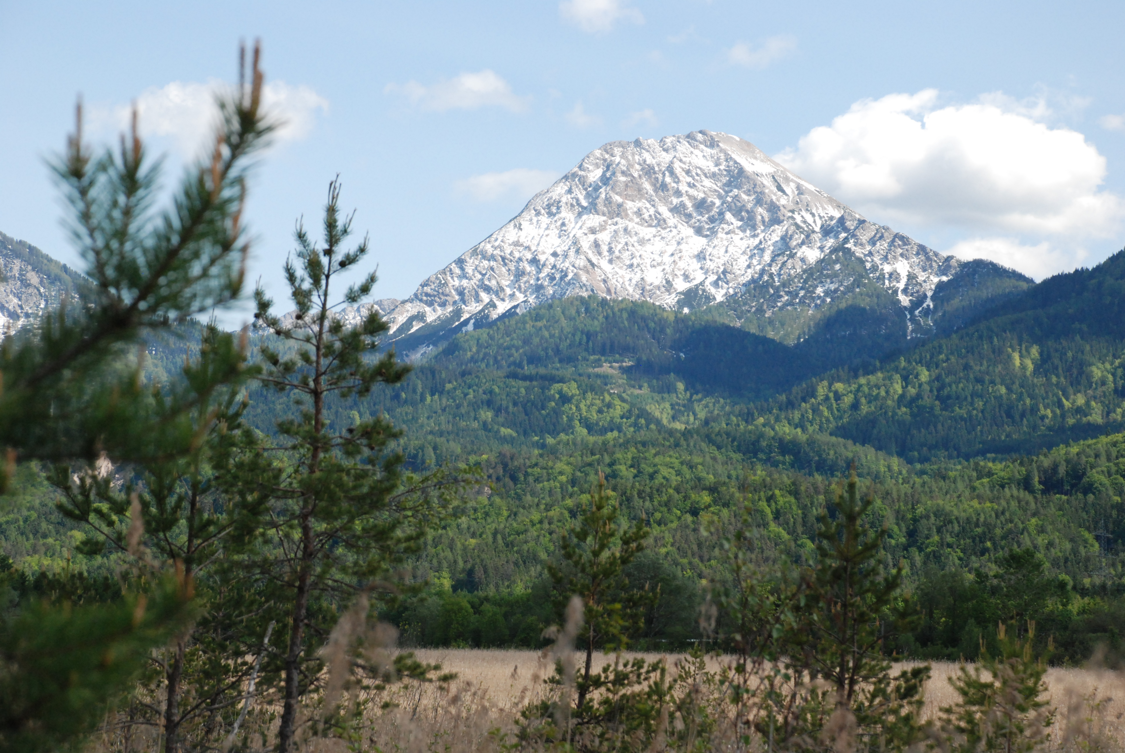 Finkensteiner Moor mit Blick auf den Mittagskogel This media shows the nature reserve in Carinthia with the ID NSG.030.